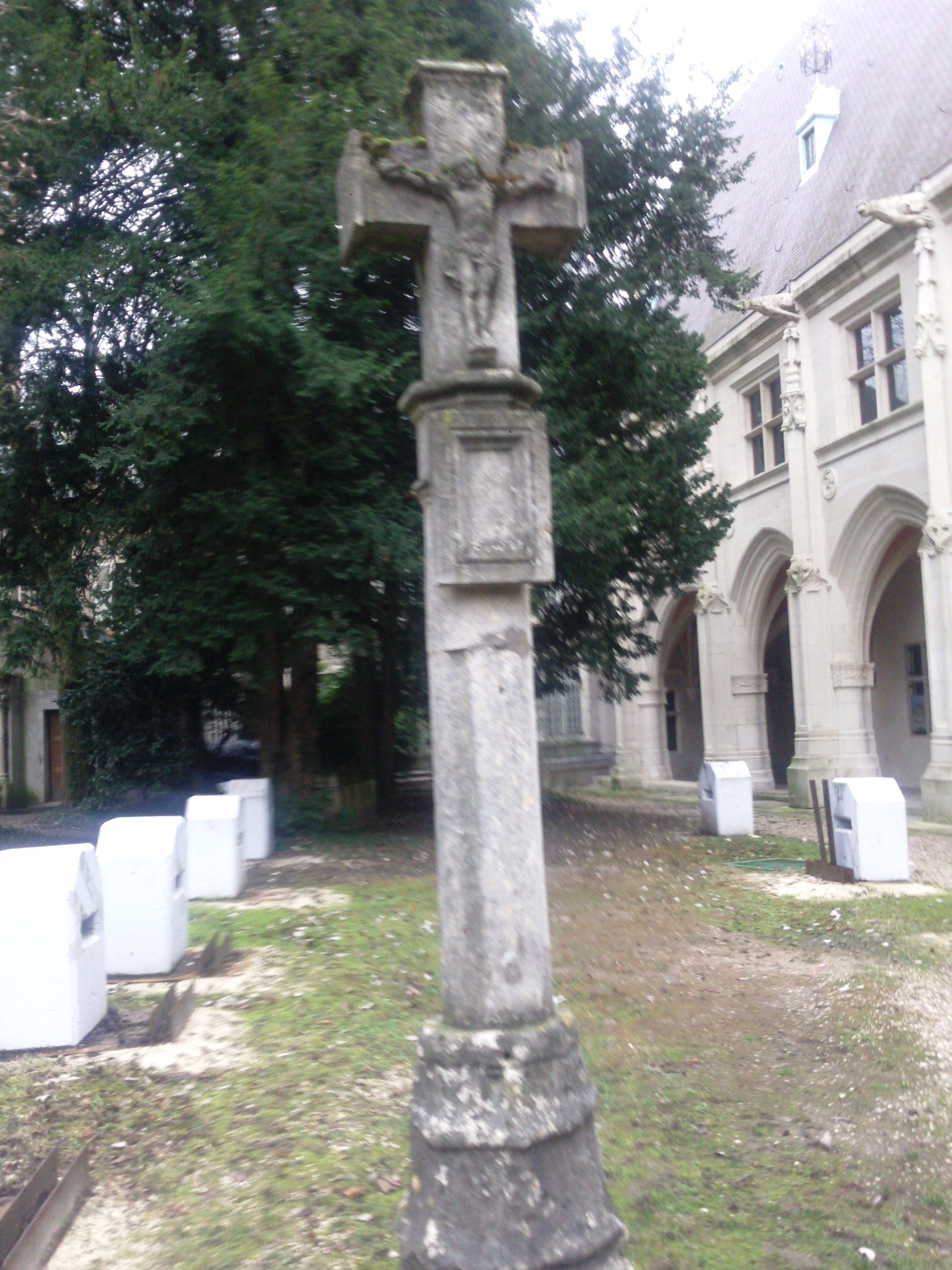 Croix d'affranchissement ( Loi de Beaumont) de Frouard -Musée Lorrain de Nancy ( photo de Robert Depardieu).